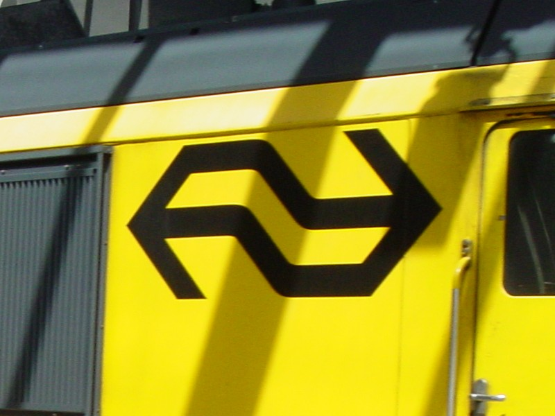 Logo op loc 1771